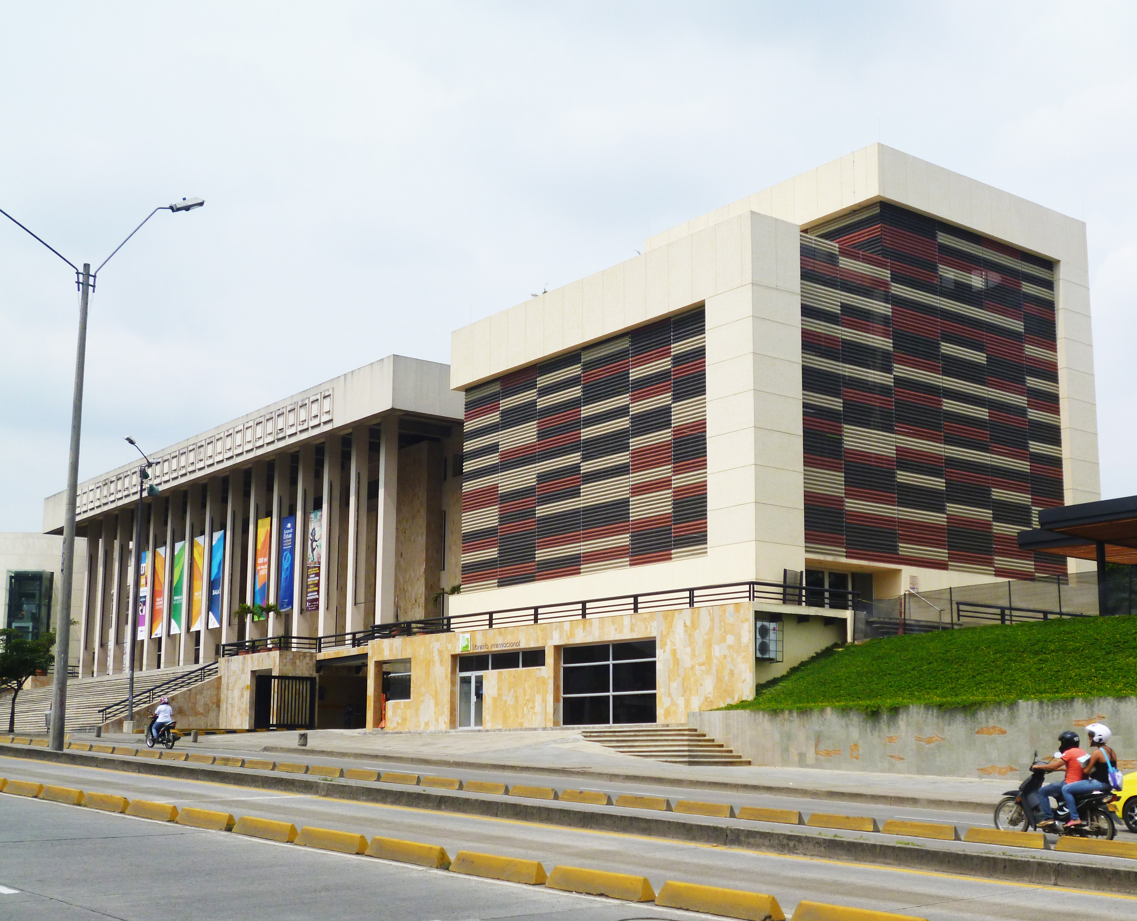 Ubicación: CALI, VALLE DEL CAUCA